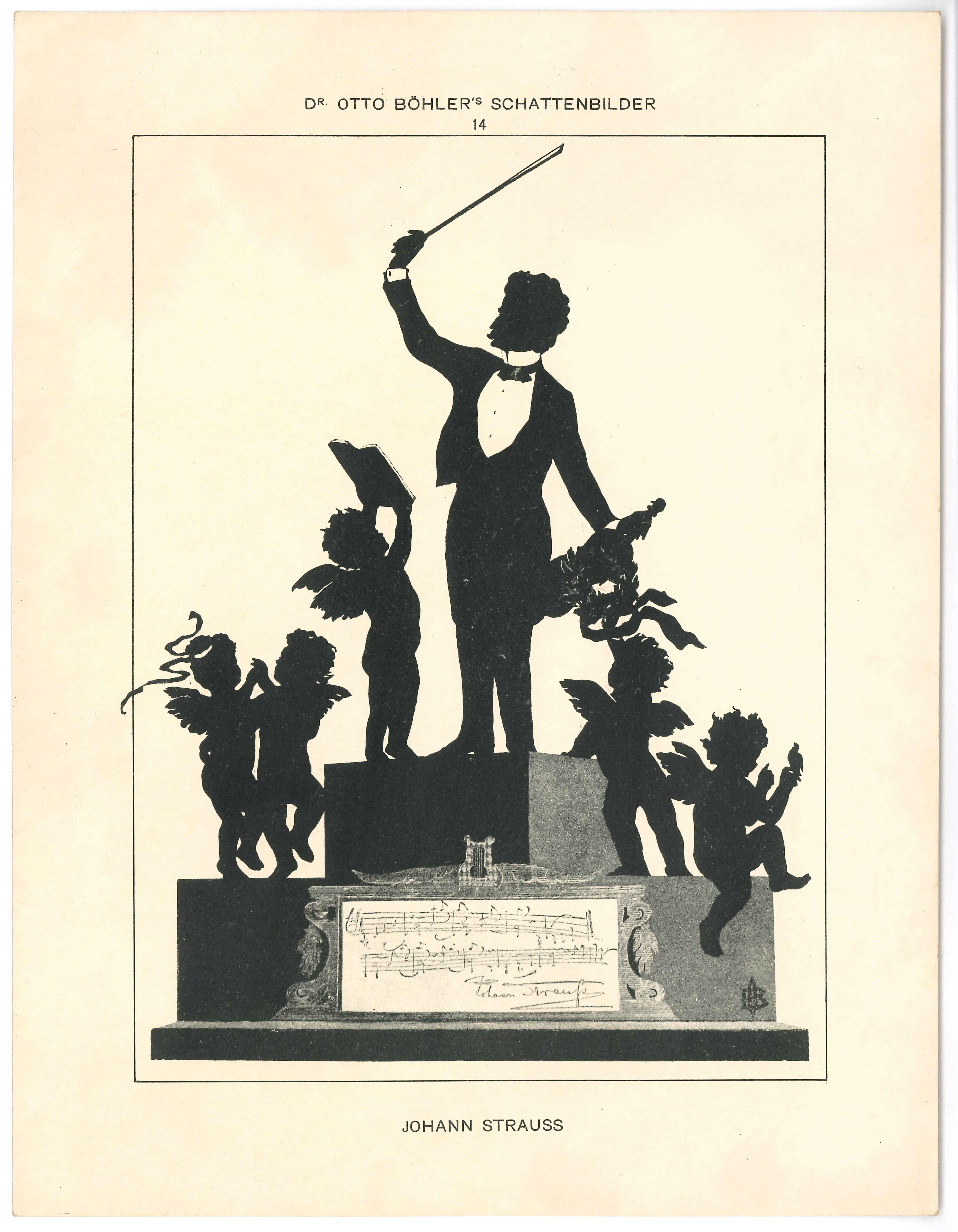 Johann Strauss II, Silhouette, 20 x 26 cm